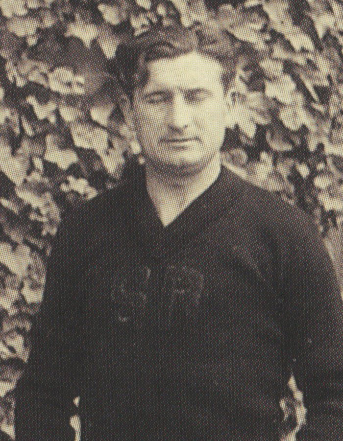 L'entraîneur du Stade rennais Josef Schneider avant la finale de la Coupe de France 1935.